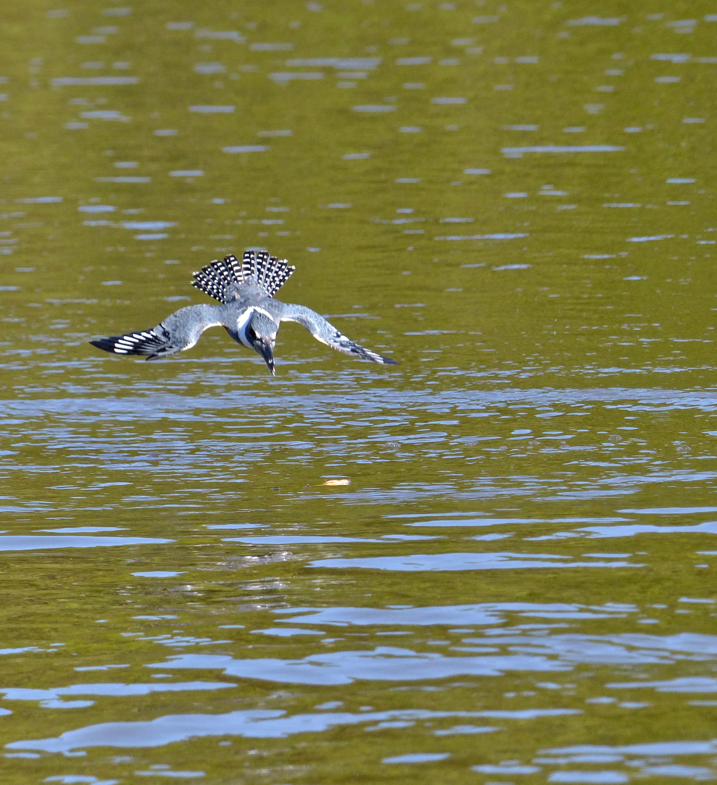 Rio Claro, Transpantaneira, Poconé, Mato Grosso, BRAZIL